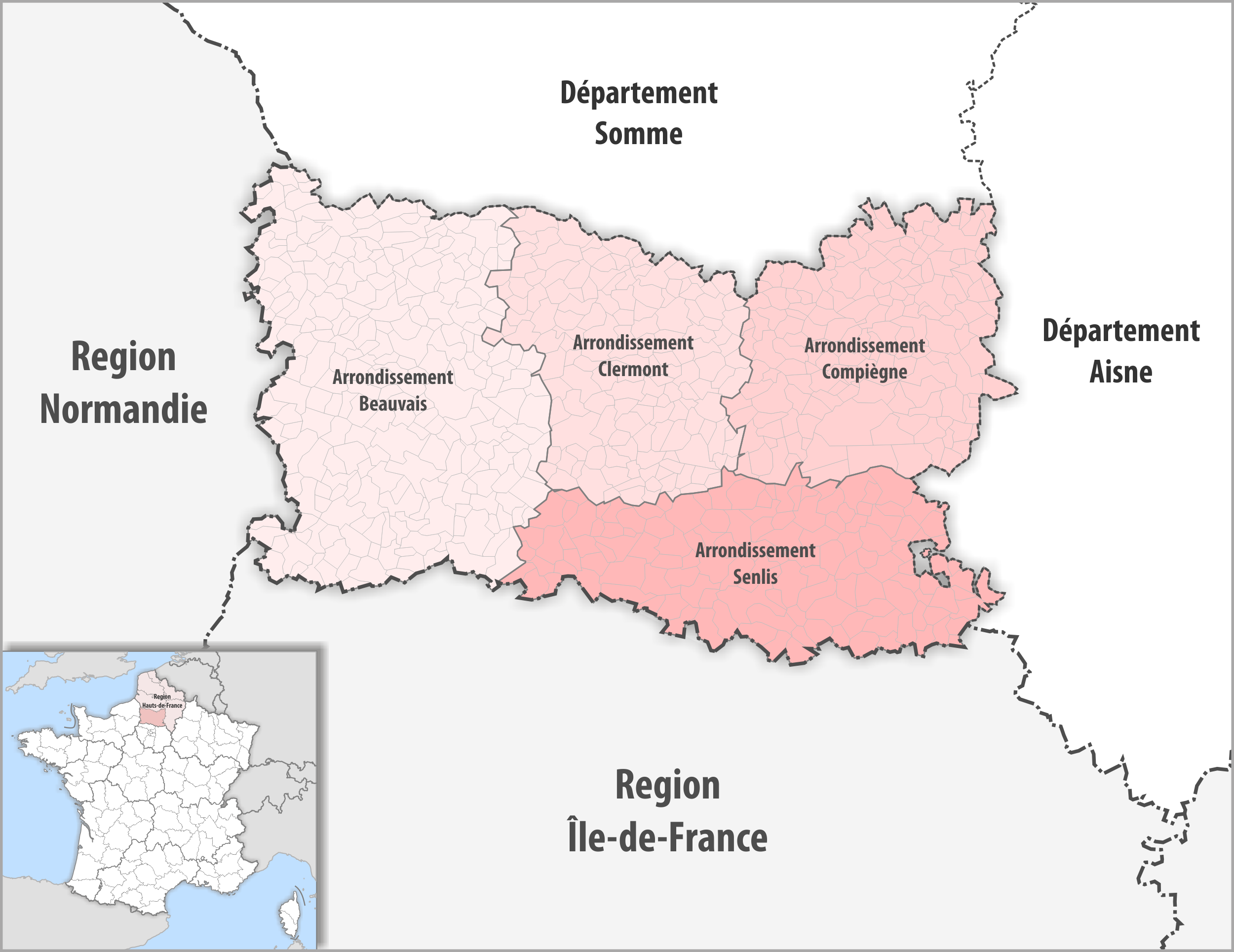 Gemeinden und Arrondissemente im Departement Oise